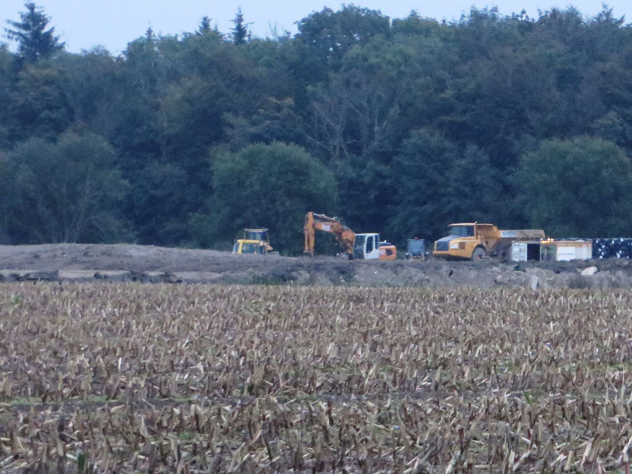 Entstehung der Deponie Harrisleehof (Am Rand von Flensburg 2014-09-29), Bild 11; Bildbasis ist das Bild 08